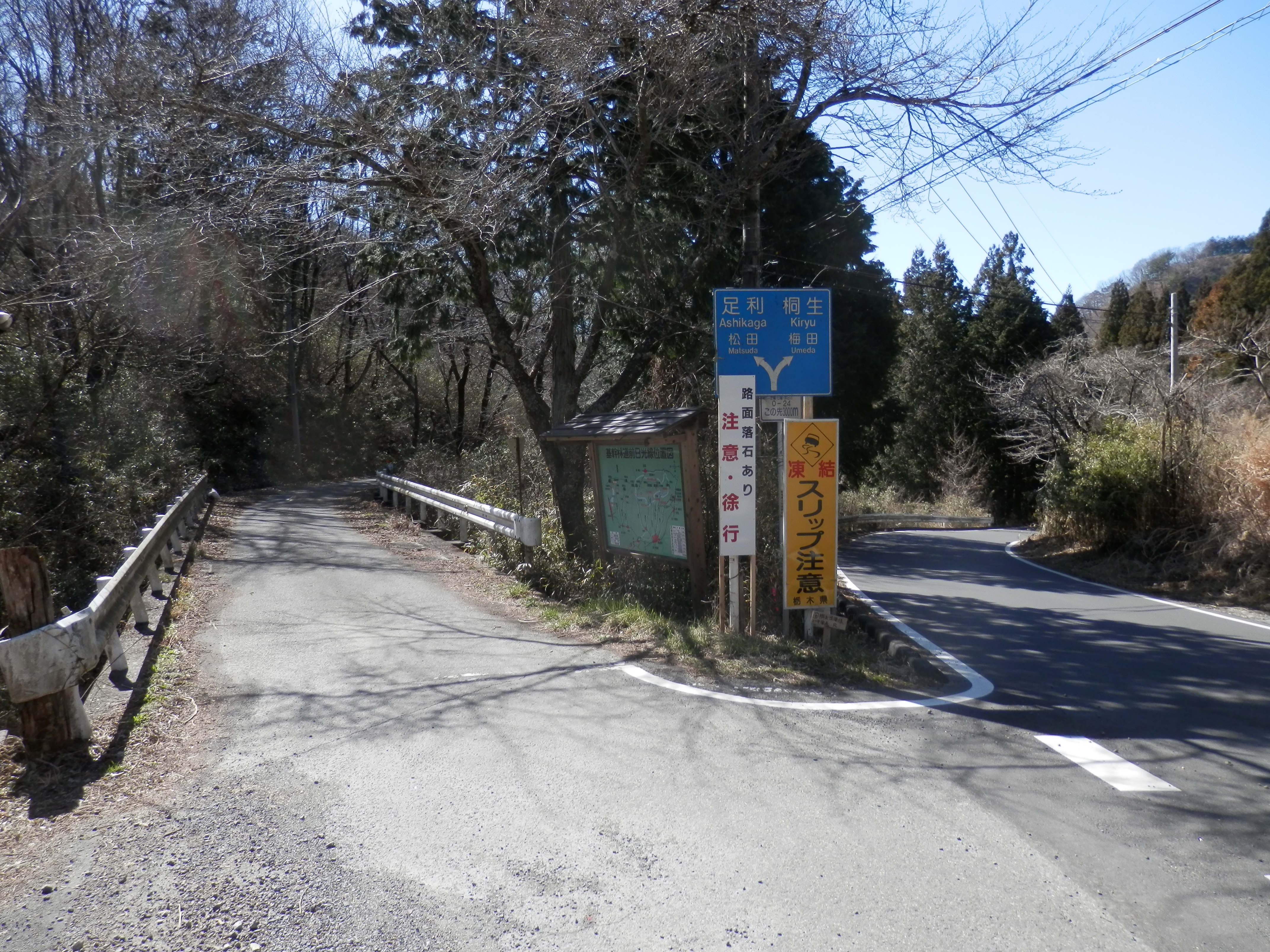 林道長石線起点（老越路峠） 右は栃木県道66号線